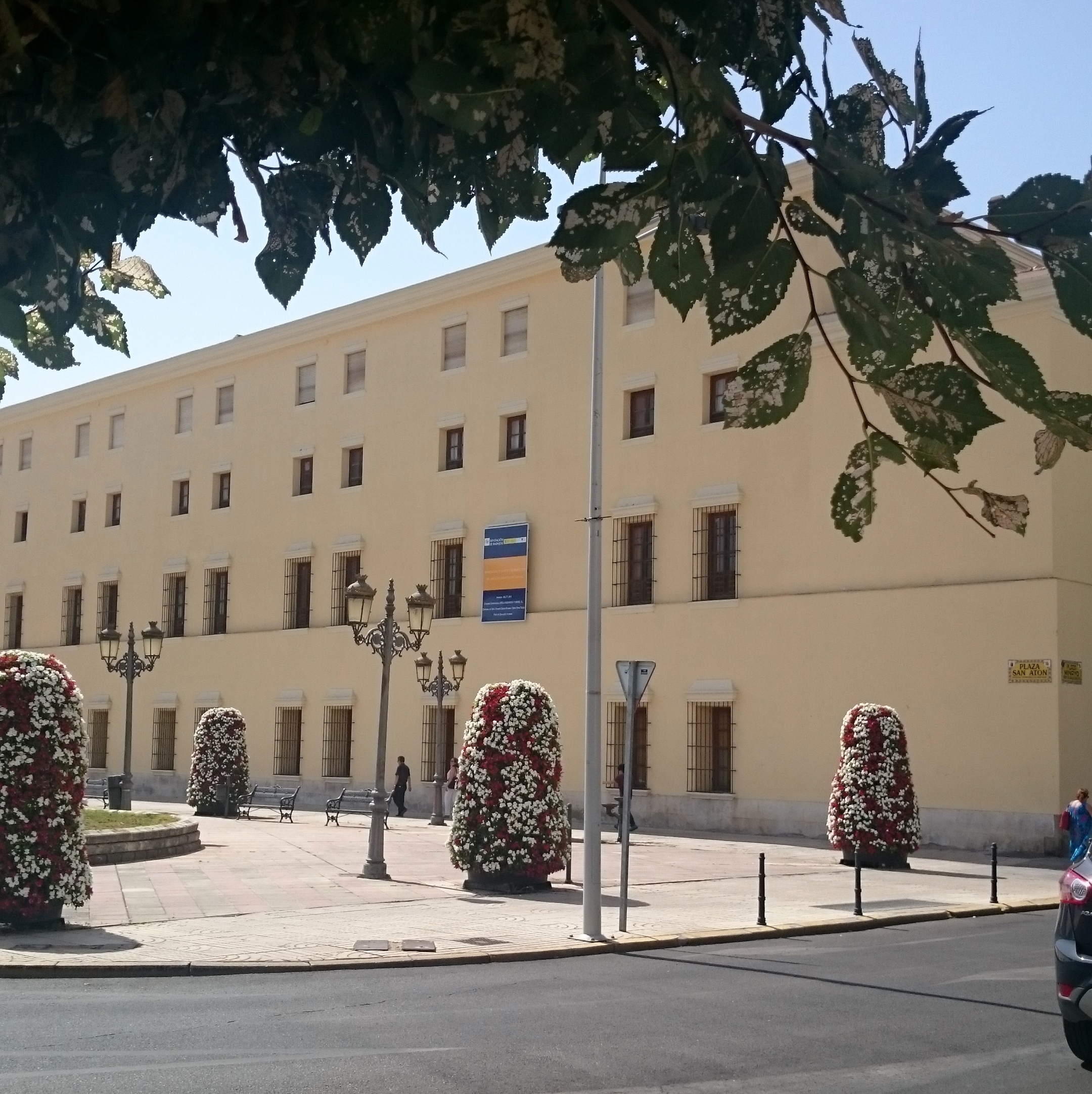 Vista del área de la Plaza San Atón en la que encontraba la Casa de la Cultura de la Plaza de Minayo, inaugurada a expensas de la Diputación Provincial en 1955 y en la que hasta principios de los años 80 muestran sus obras numerosos pintores pacenses del momento. A la derecha, aspecto en 2017 del antiguo Hospital Provincial, totalmente reformado.